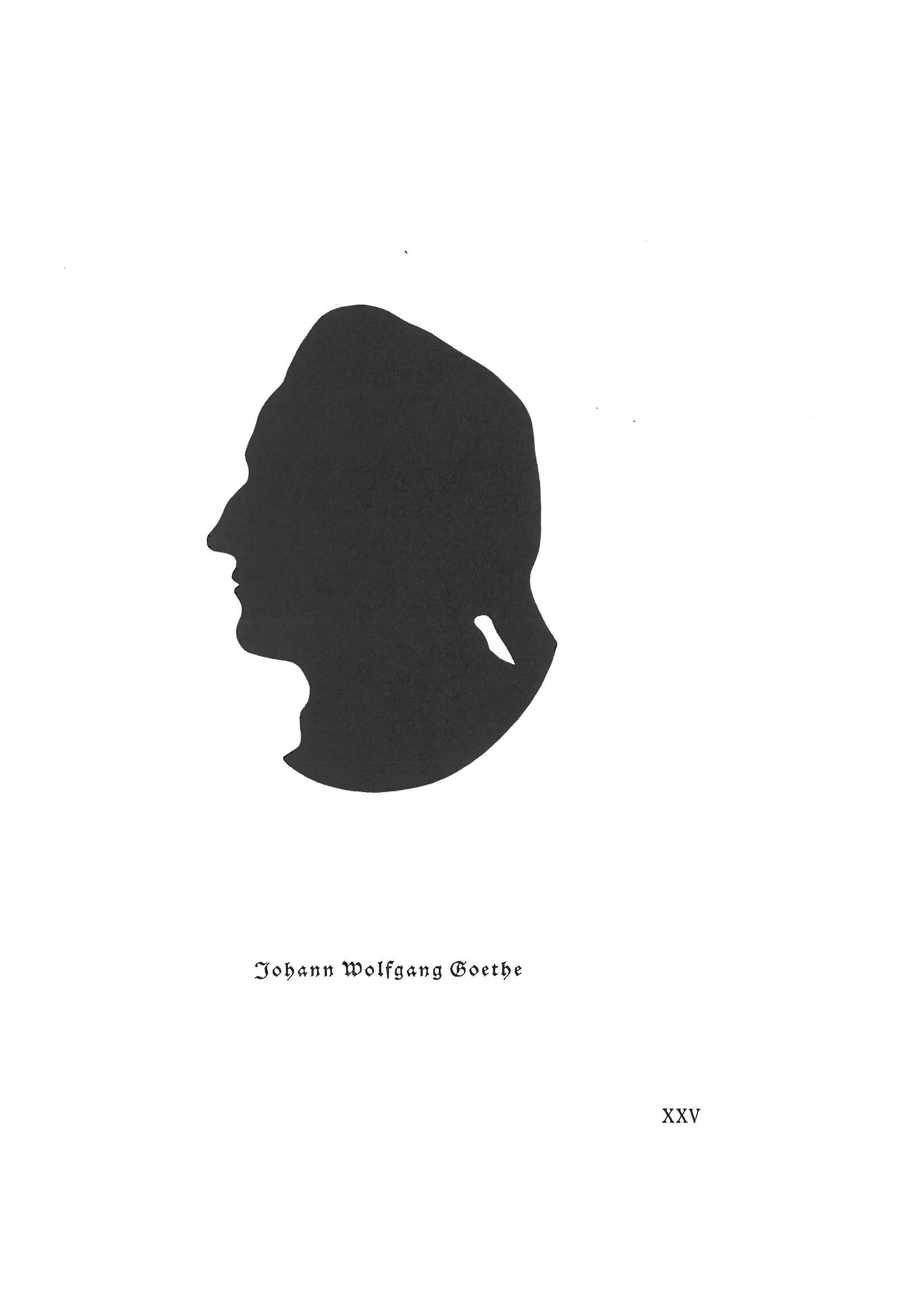 Schattenriss Goethe in der Silhouetten-Sammlung Schubert Tafel XXV